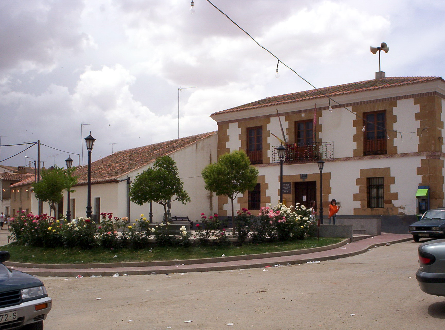 Plaza del pueblo